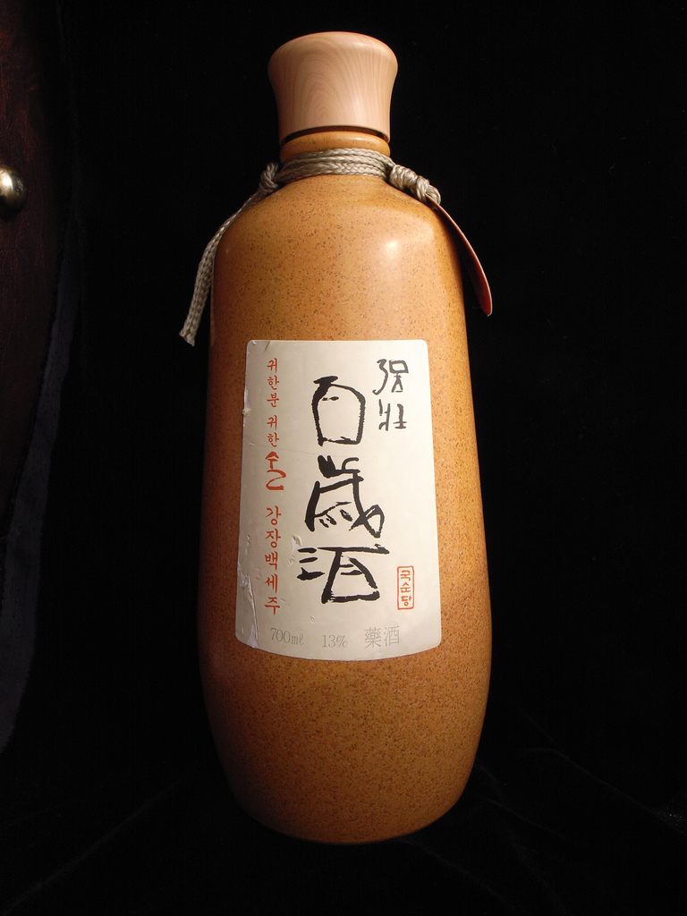 Baeseju 한국의 술, 백세주